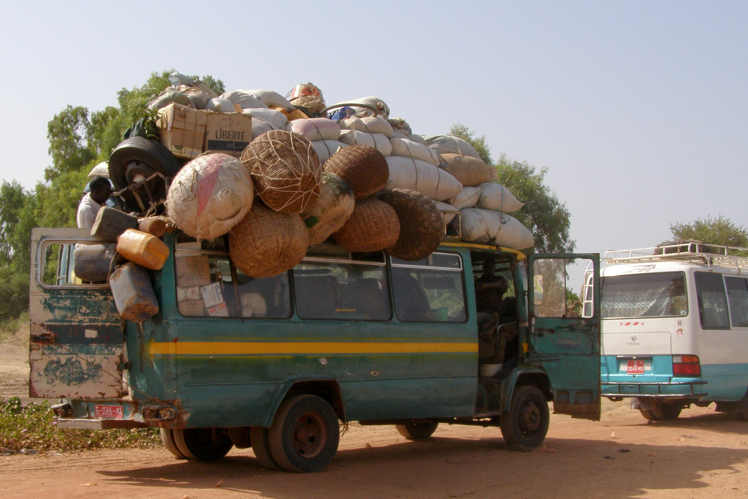 Transports dangereux - Mali